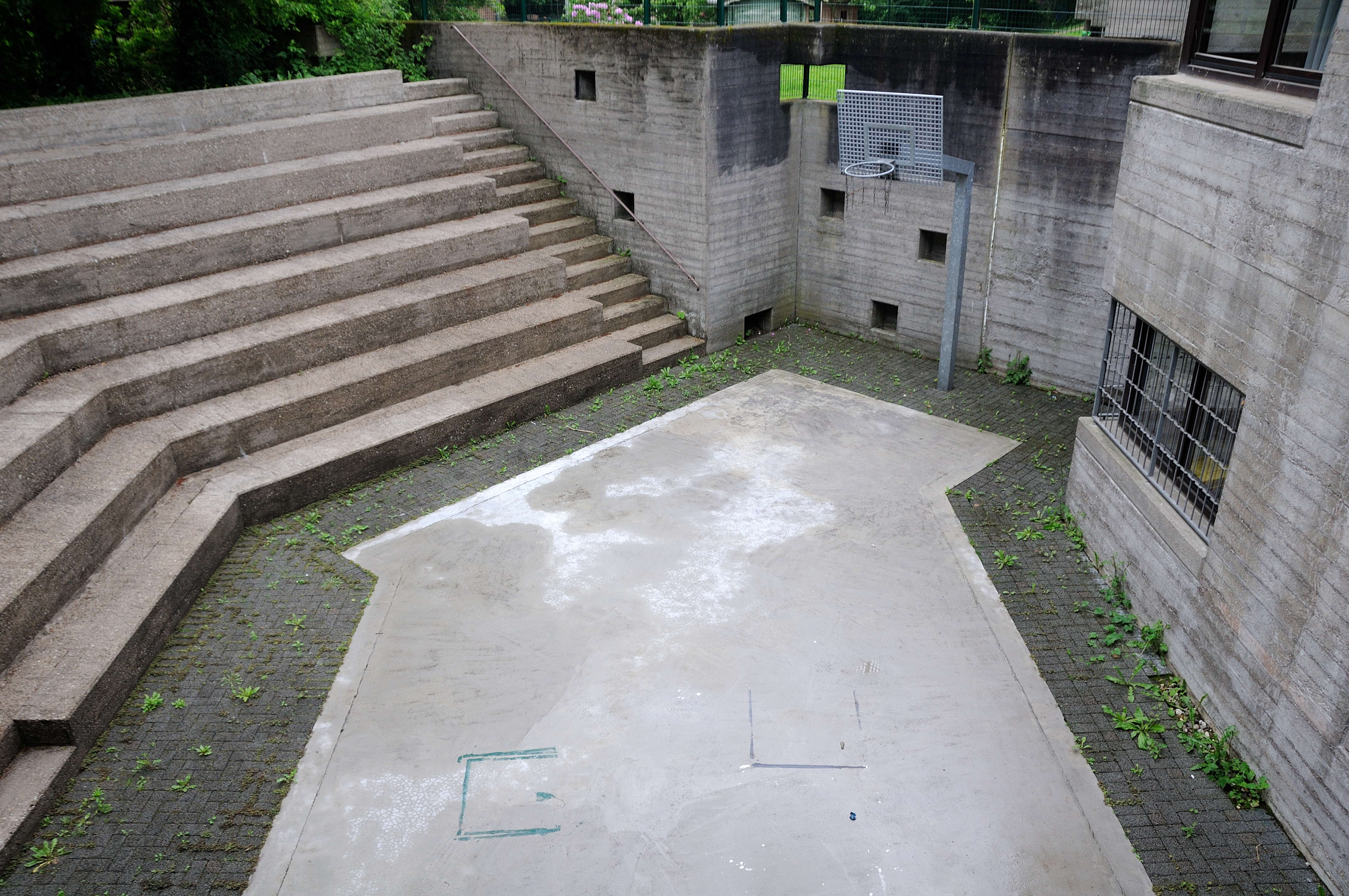 Die Abbildung stellt das östlich gelegene Amphitheater der Friedenskirche in Monheim-Baumberg dar.